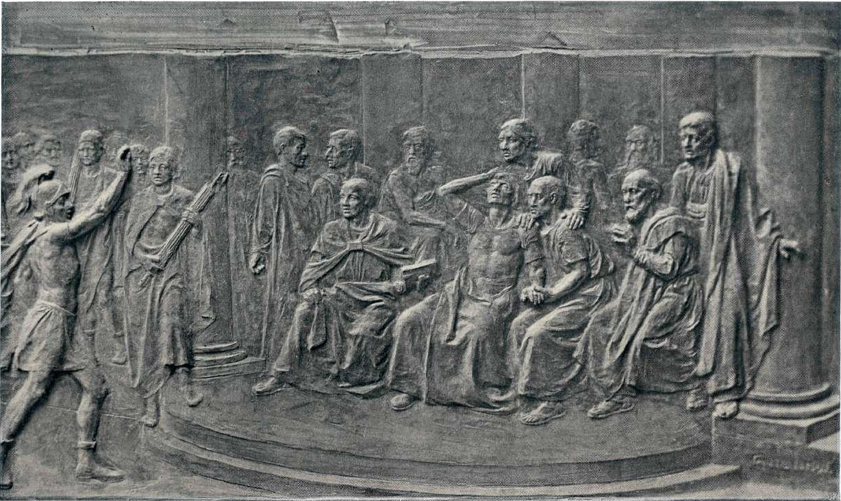 Hanibal pred vratmi.